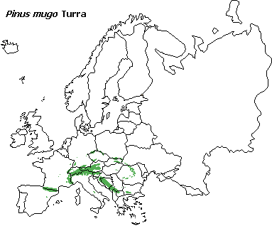 Range of Pinus mugo Turra (répartition du pin mugo)